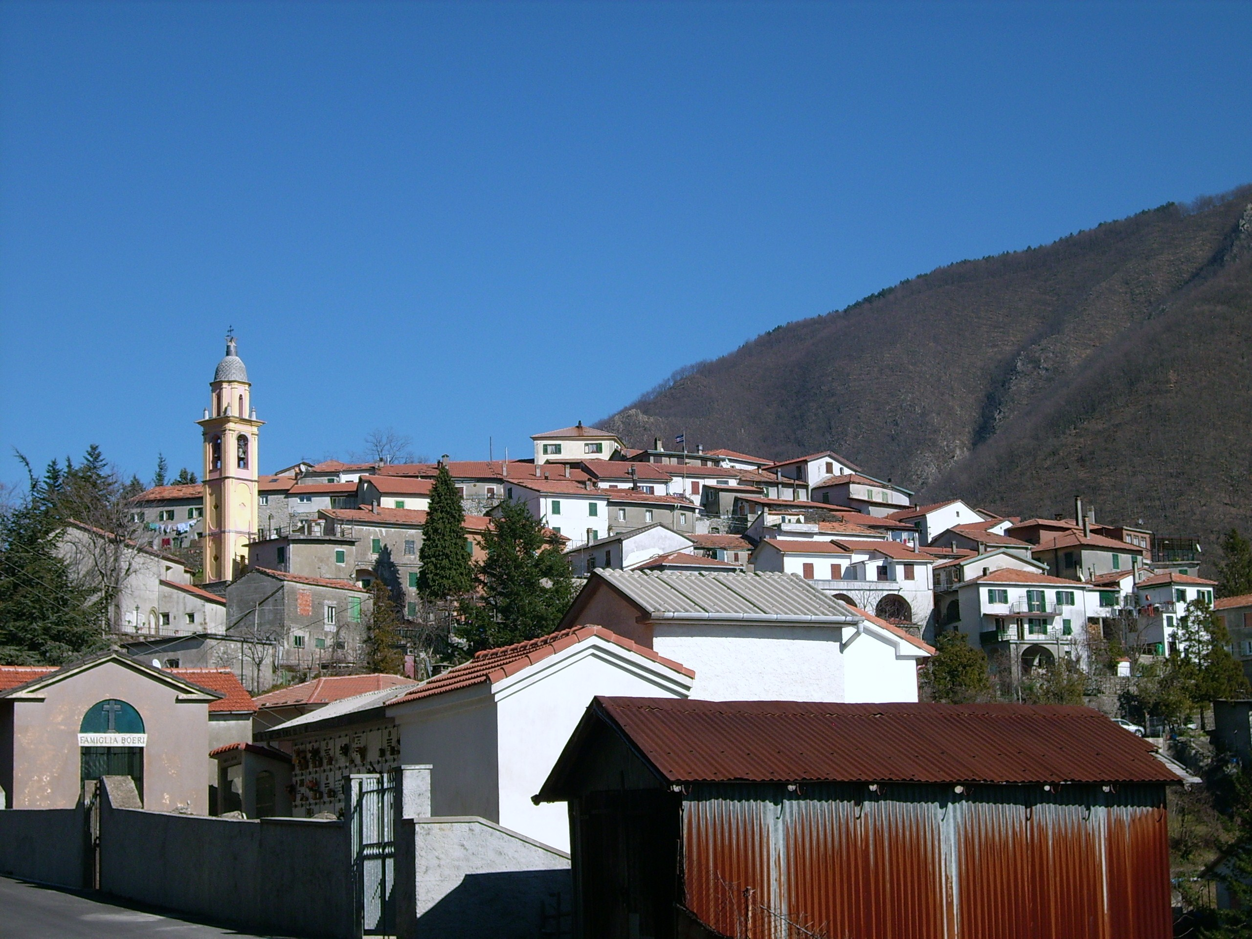 Panorama di Chiusola, Sesta Godano, Liguria, Italy